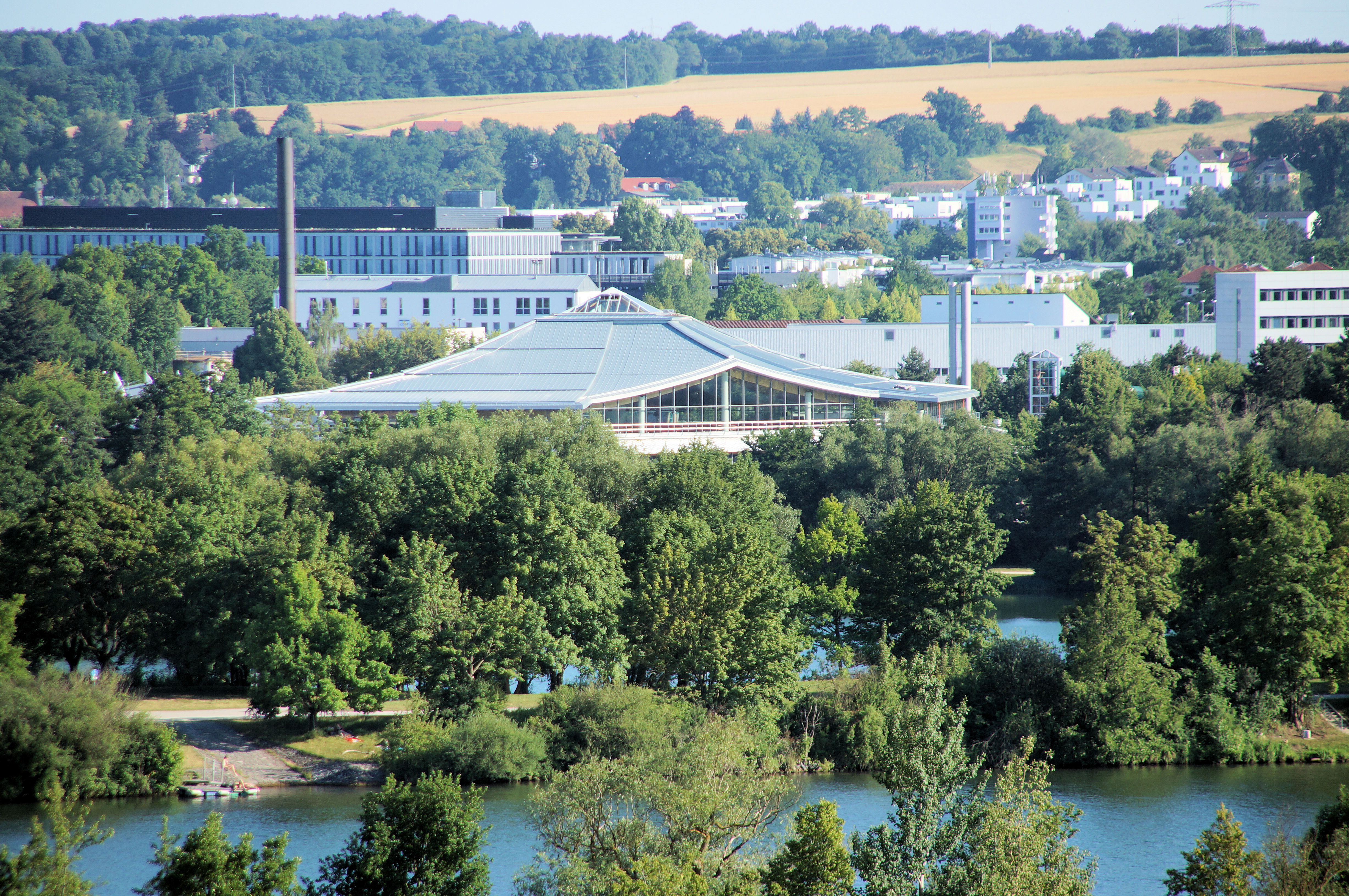 Schwimmhalle des Westbads Regensburg, gesehen von den Winzerer Höhen